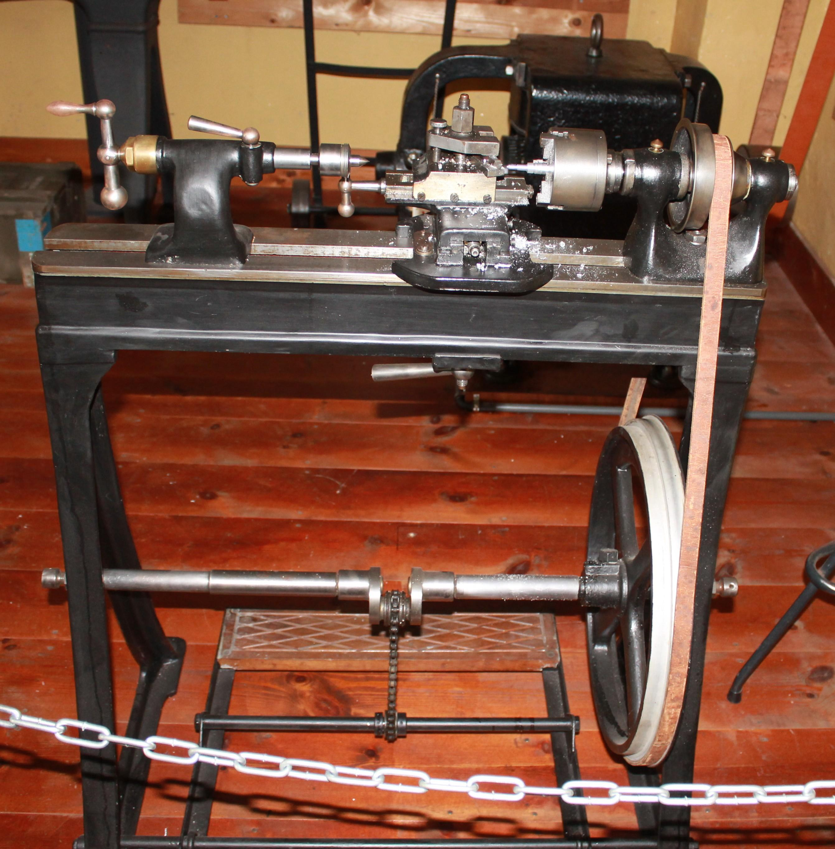 Drehbank mit Fußantrieb